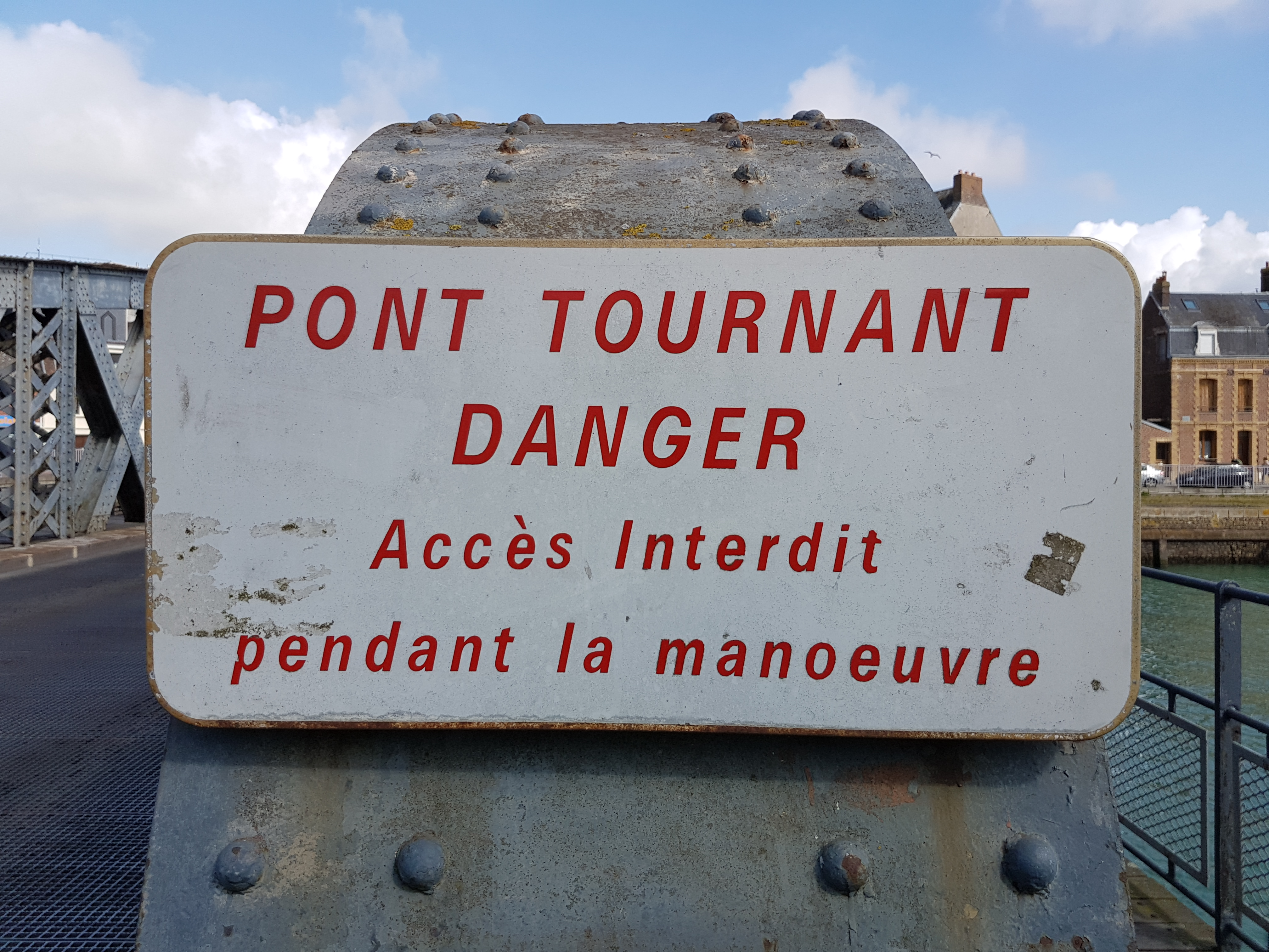 Panneau "Pont tournant, danger" à l'entrée du pont Colbert (Dieppe, Seine-Maritime) en avril 2017.